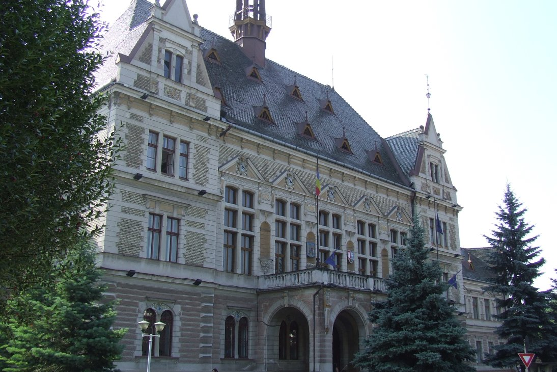 Image from Deva, Romania